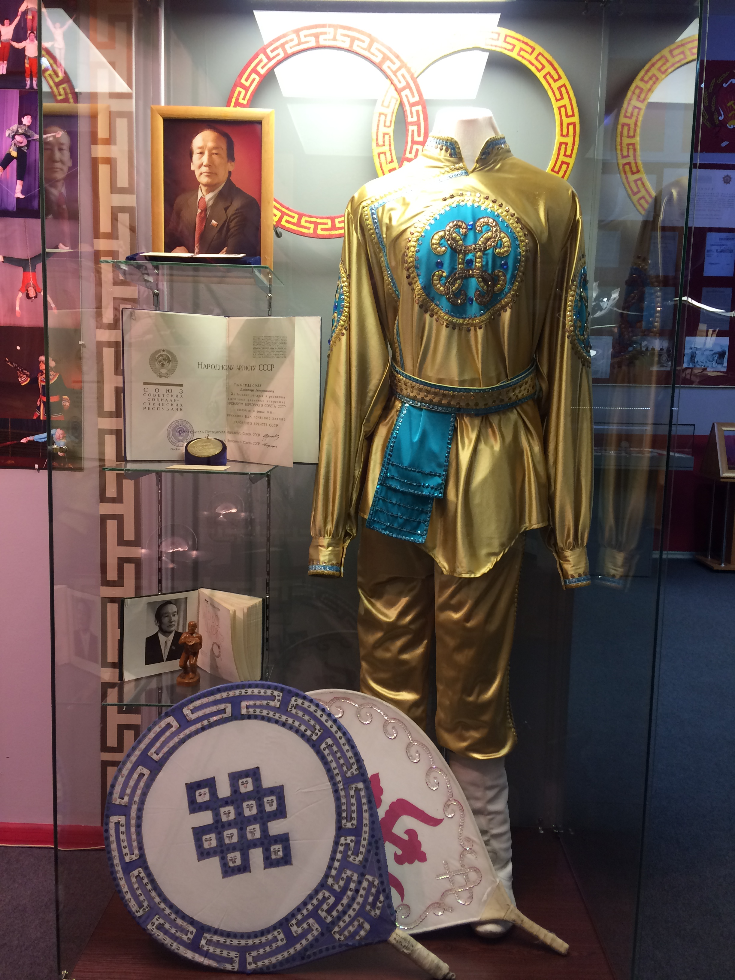 Сценический костюм Оскал-оола Владимира Базыр-ооловича (советский тувинский актер цирка). Из экспозиции Национального музея Республики Тыва "Алдан-Маадыр"